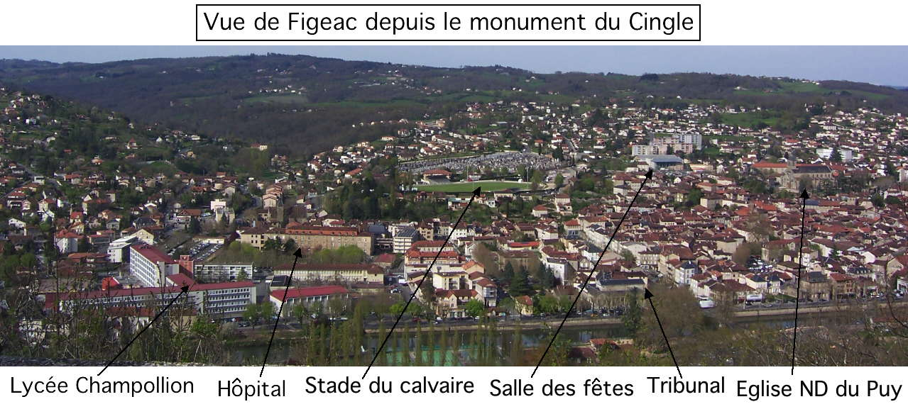 Vue de Figeac depuis le monument du Cingle avec désignation de certains lieux de la ville.